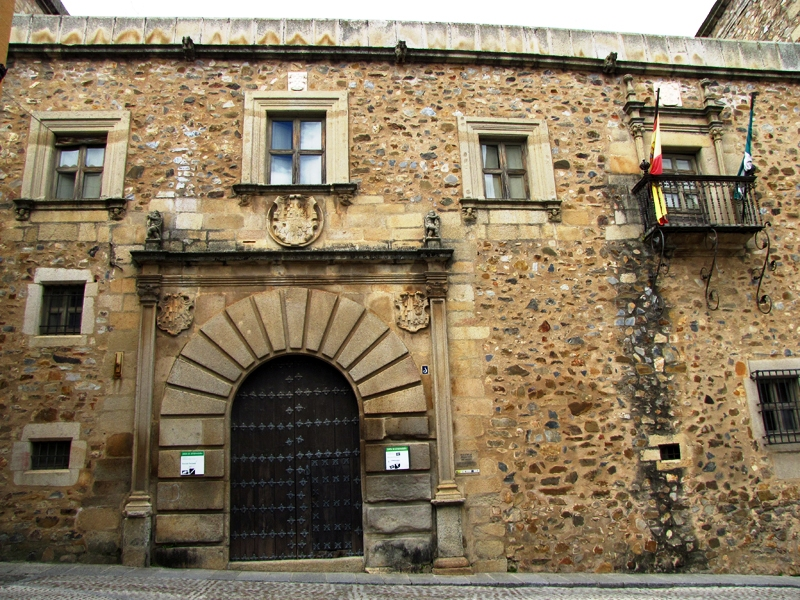 Fachada principal del Palacio de Godoy en la ciudad de Cáceres (España)